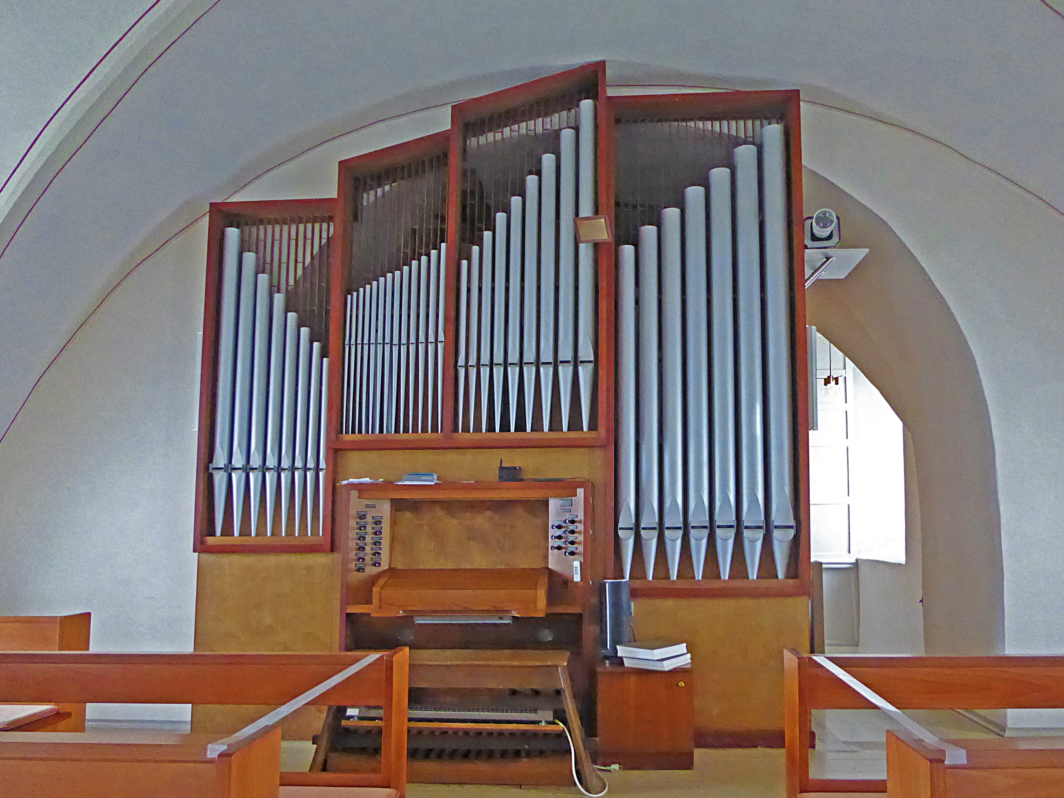 Orgel von Jehmlich Orgelbau (1965 II/P 18) in der Kirche St. Simon und Judas in Neustadt (Eichsfeld)